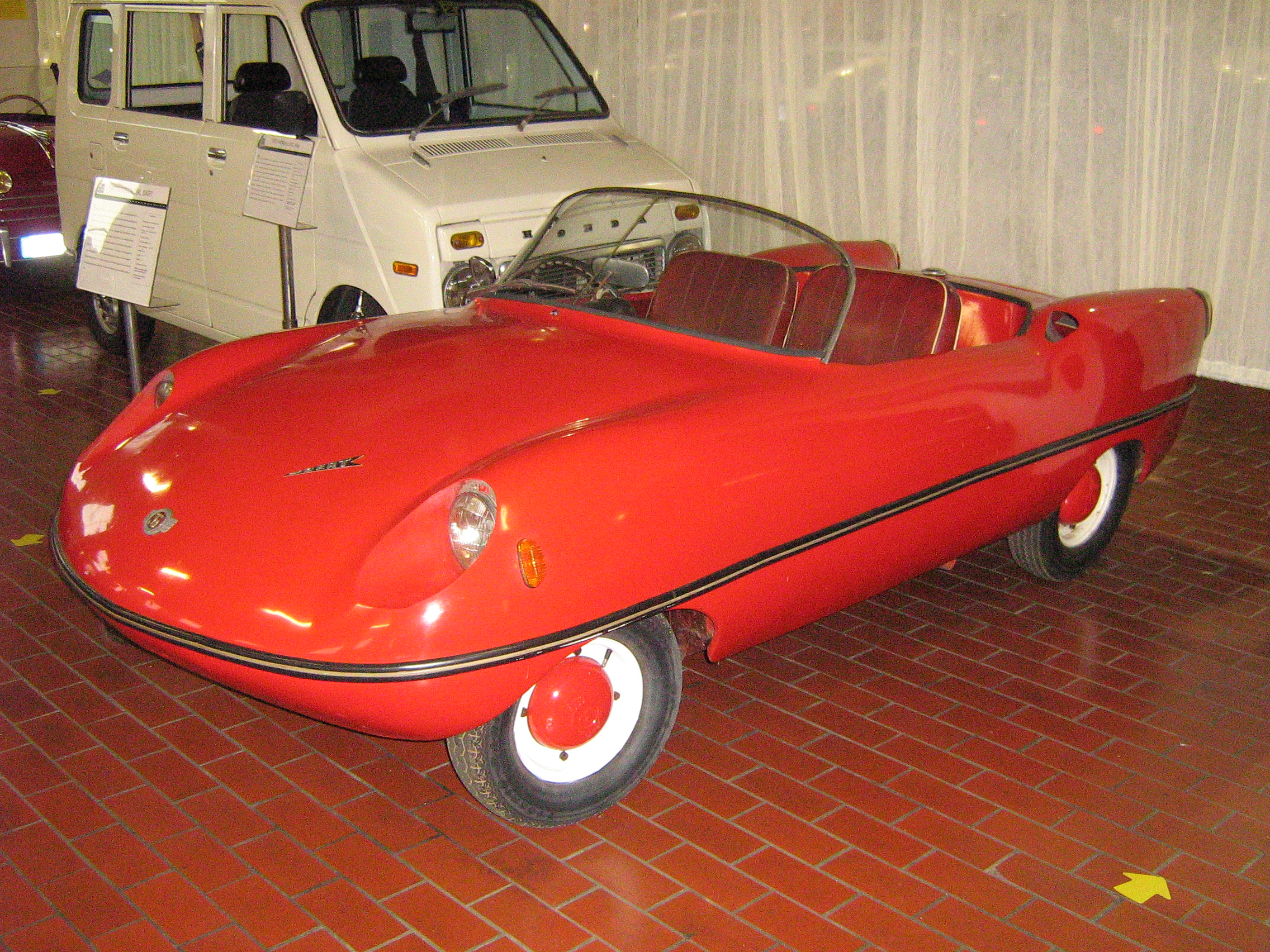 1960 Goggomobil Dart